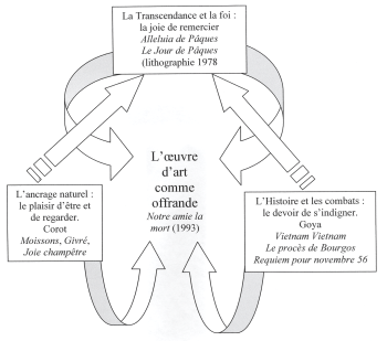 L'oeuvre de Manessier